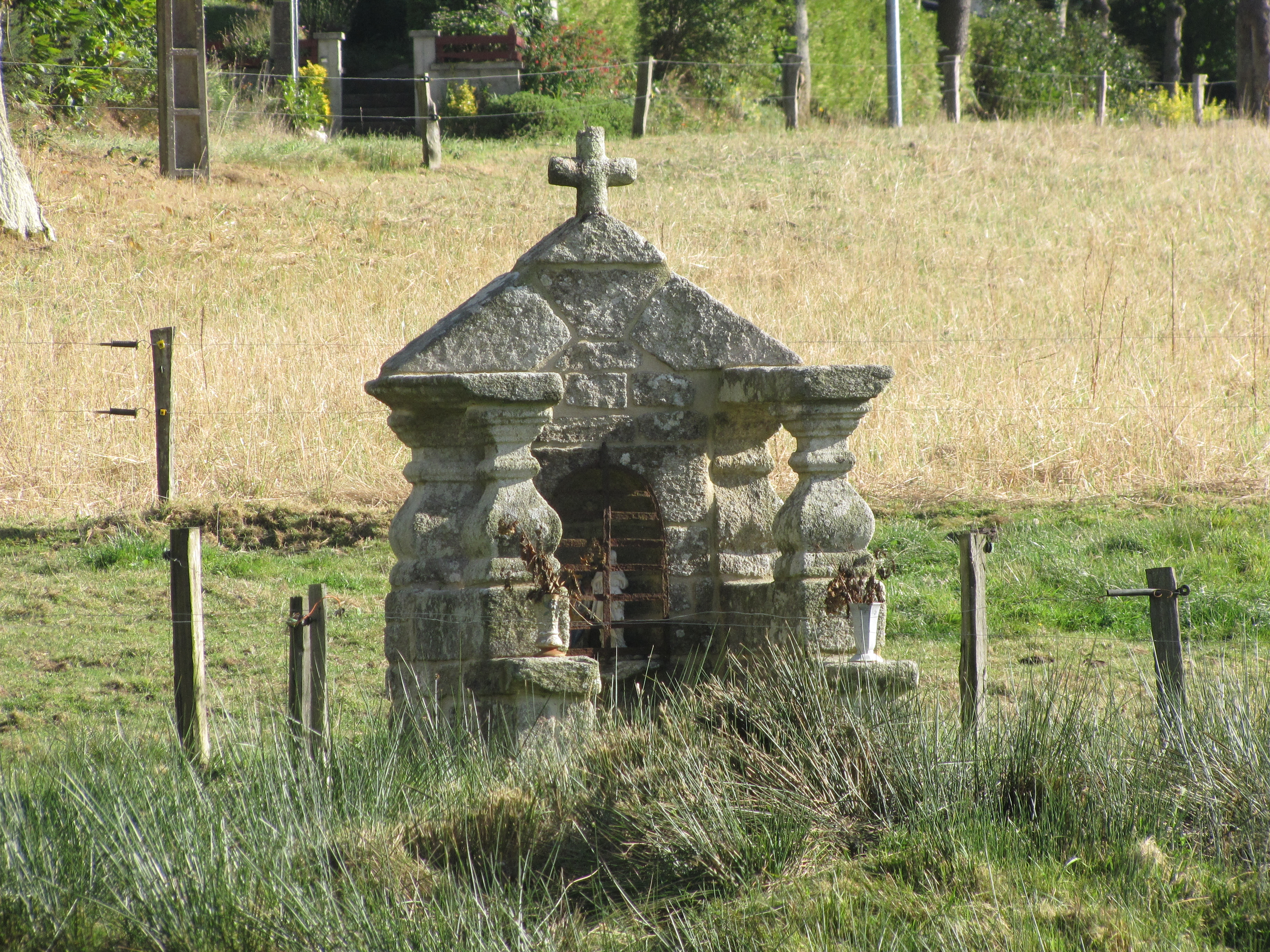 Située à 200m de la chapelle dans un champ privé .